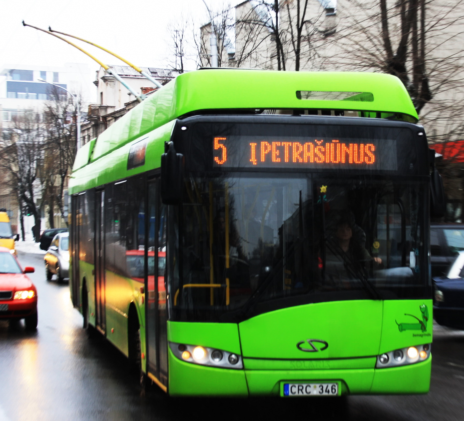 Trolleybus Solaris Trollino in Kaunas.